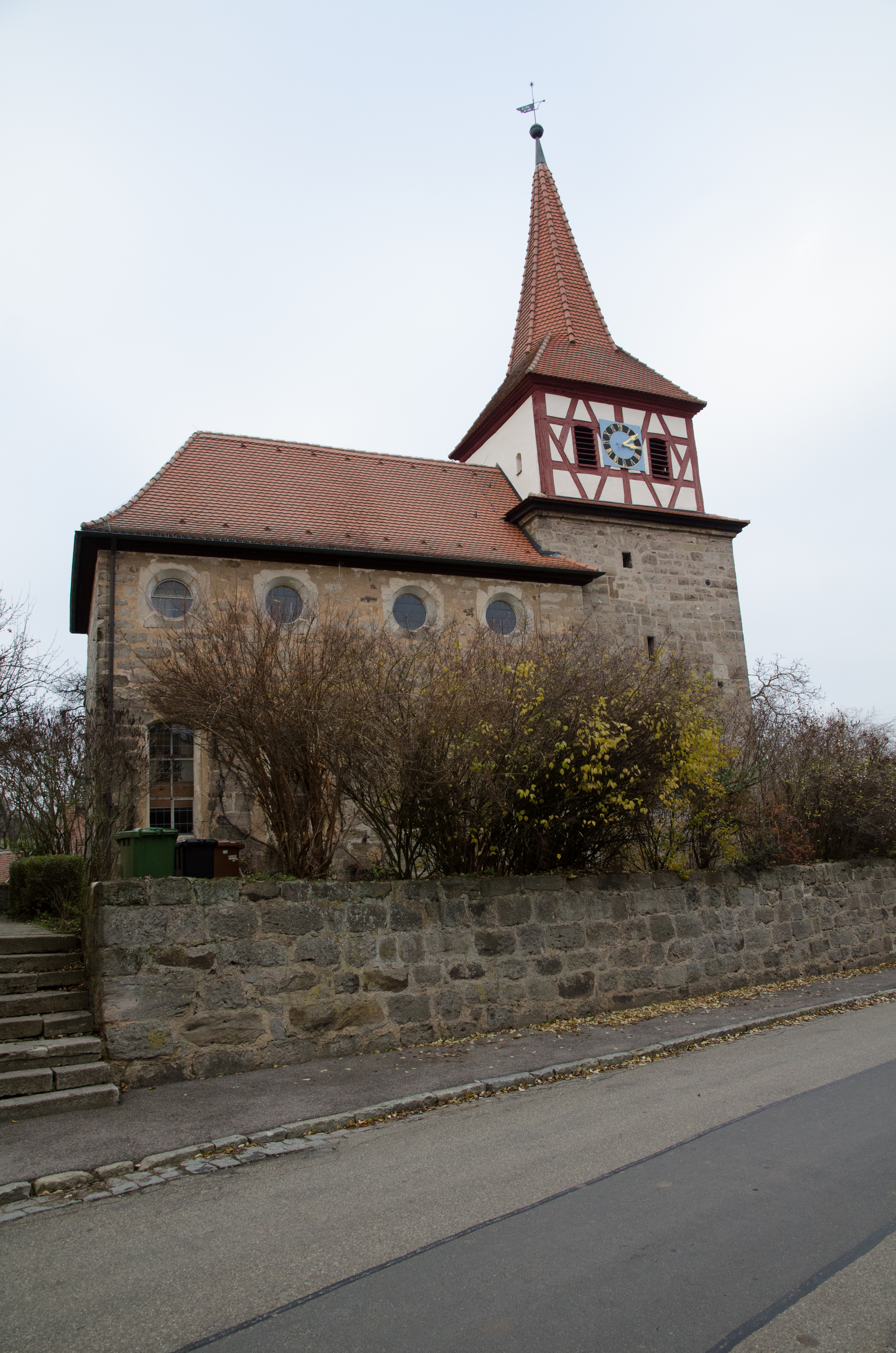 Obernzenn, Egenhausen, Allerheiligenkirche